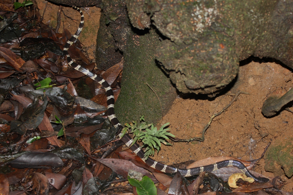 Many-banded Krait (Bungarus multicinctus), Taken at Tai Mo Shan.